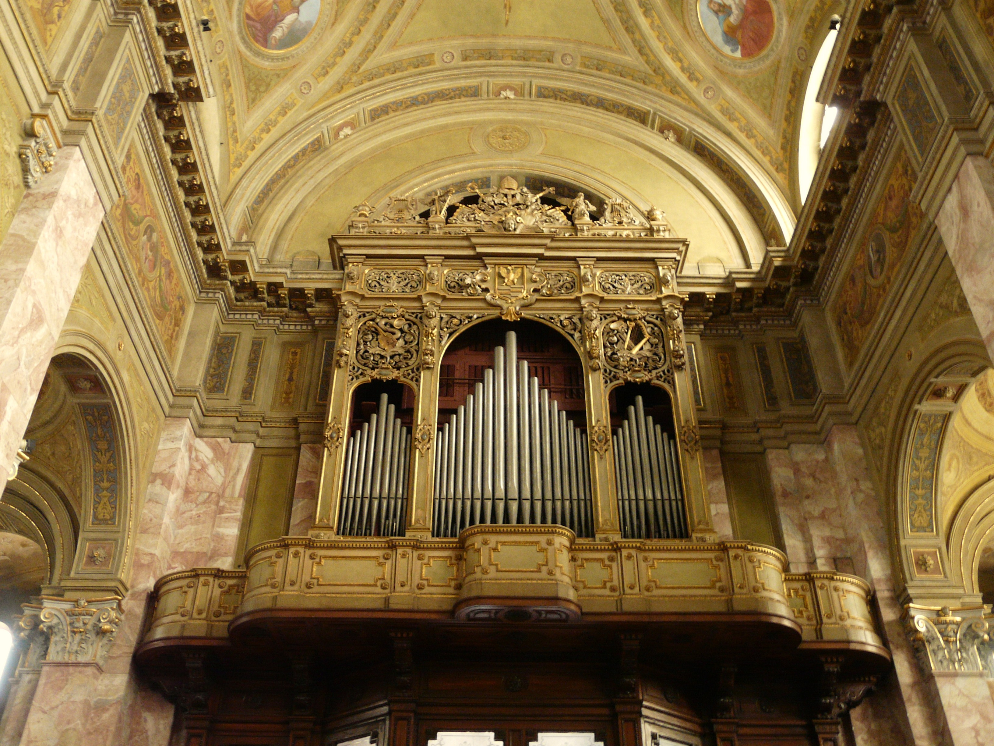 Organo a canne della Chiesa di San Martino, Magenta, Lombardia, Italia